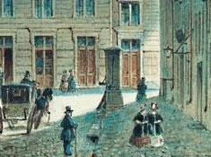 Blick aus der Dorotheenstraße auf die Alte Sternwarte in Berlin. Aquarell.